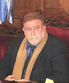 Walter Zimmer, Intendente de Colonia.